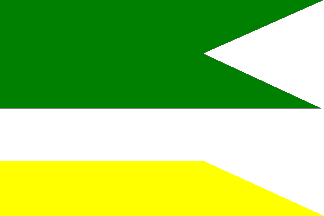 Szap község zászlaja, Szlovákia